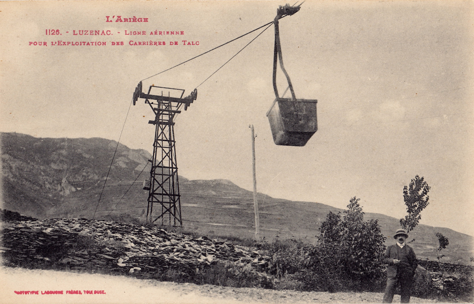 Carte postale ancienne éditée par Labouches Frère à Toulouse, collection "L'Ariège", n°1126 : LUZENAC - Ligne aérienne pour l'explloitation des Carrières de Talc